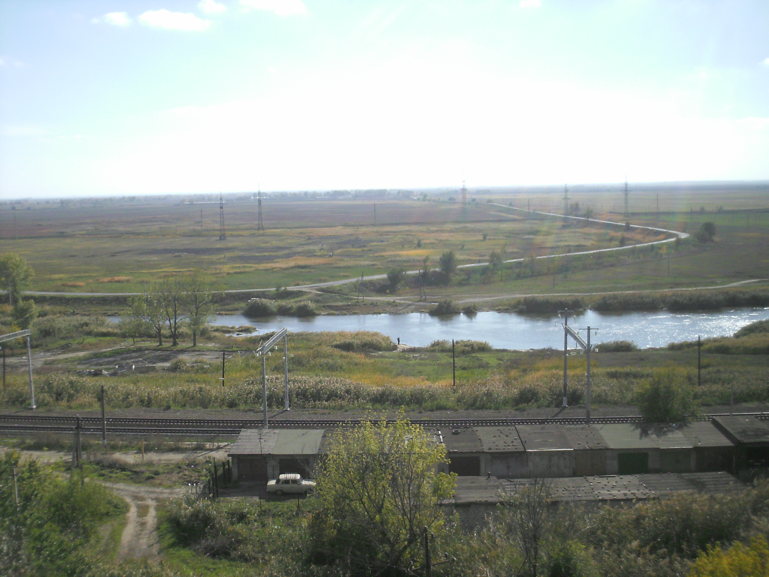 Река Аксай в Новочеркасске